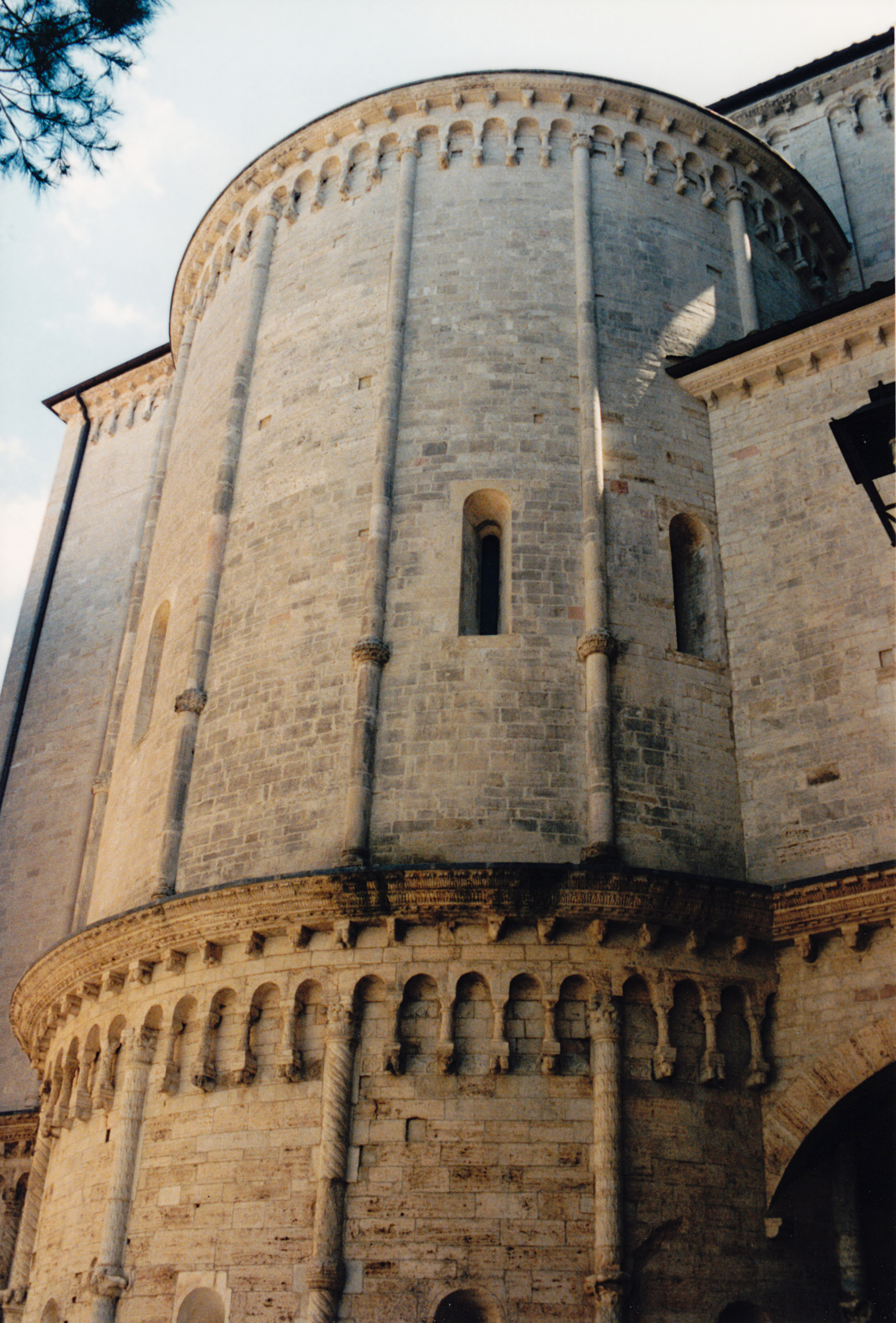 Italie - Ombrie - Cathédrale de Todi